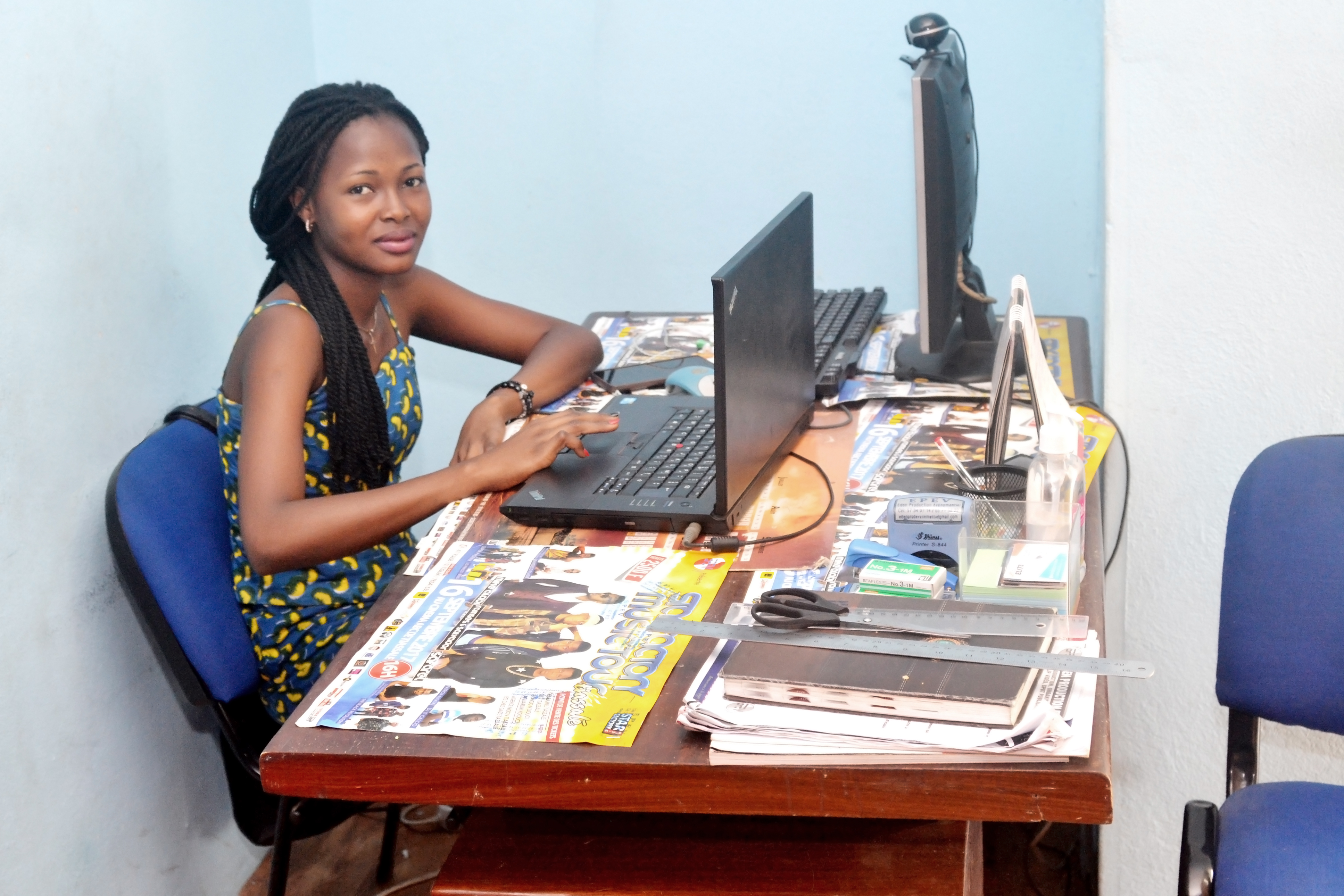 une assistante de direction dans une PME à Abidjan This is an image of "African people at work" from Ivory Coast